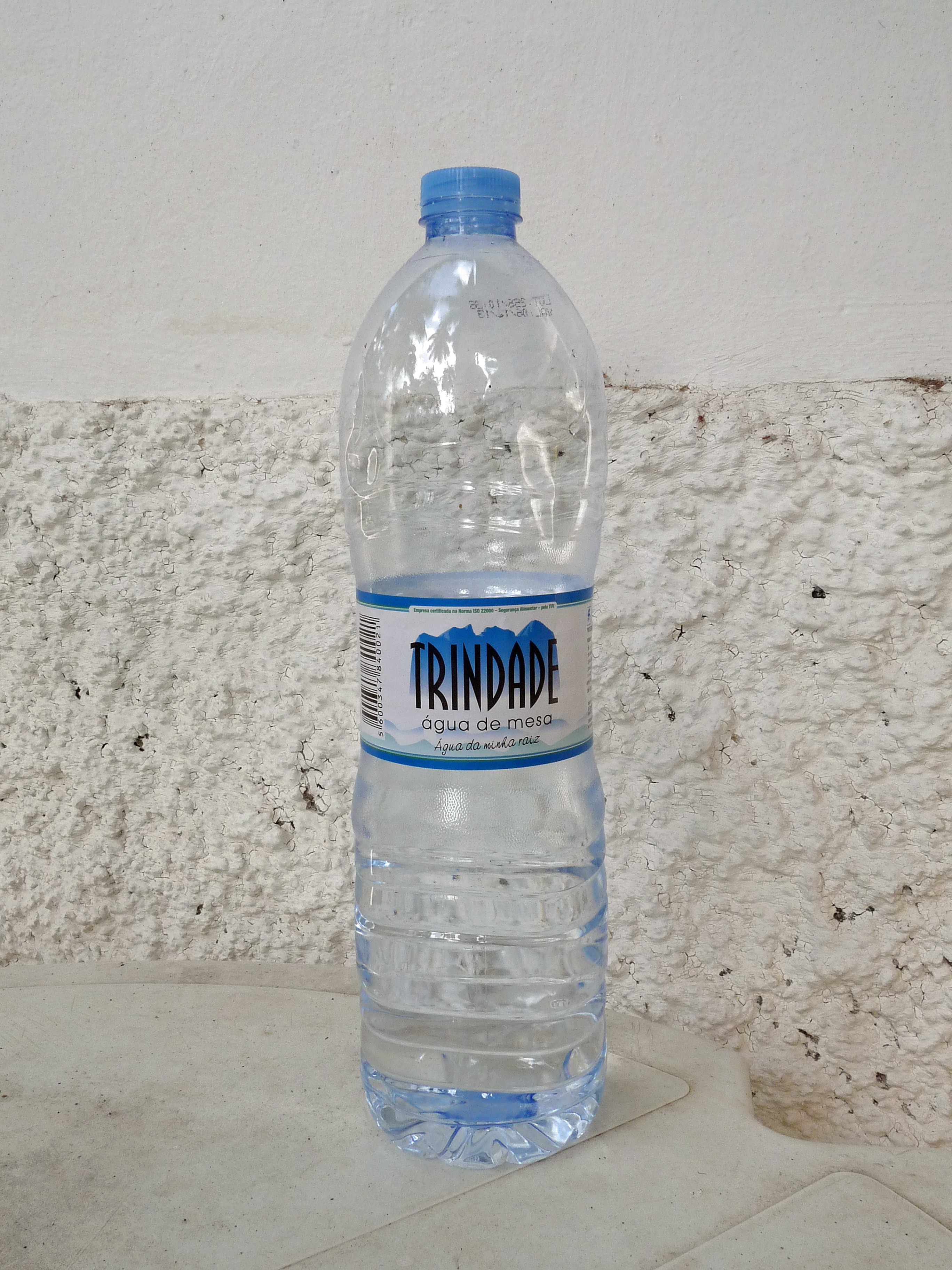 Trindade, eau minérale du Cap-Vert